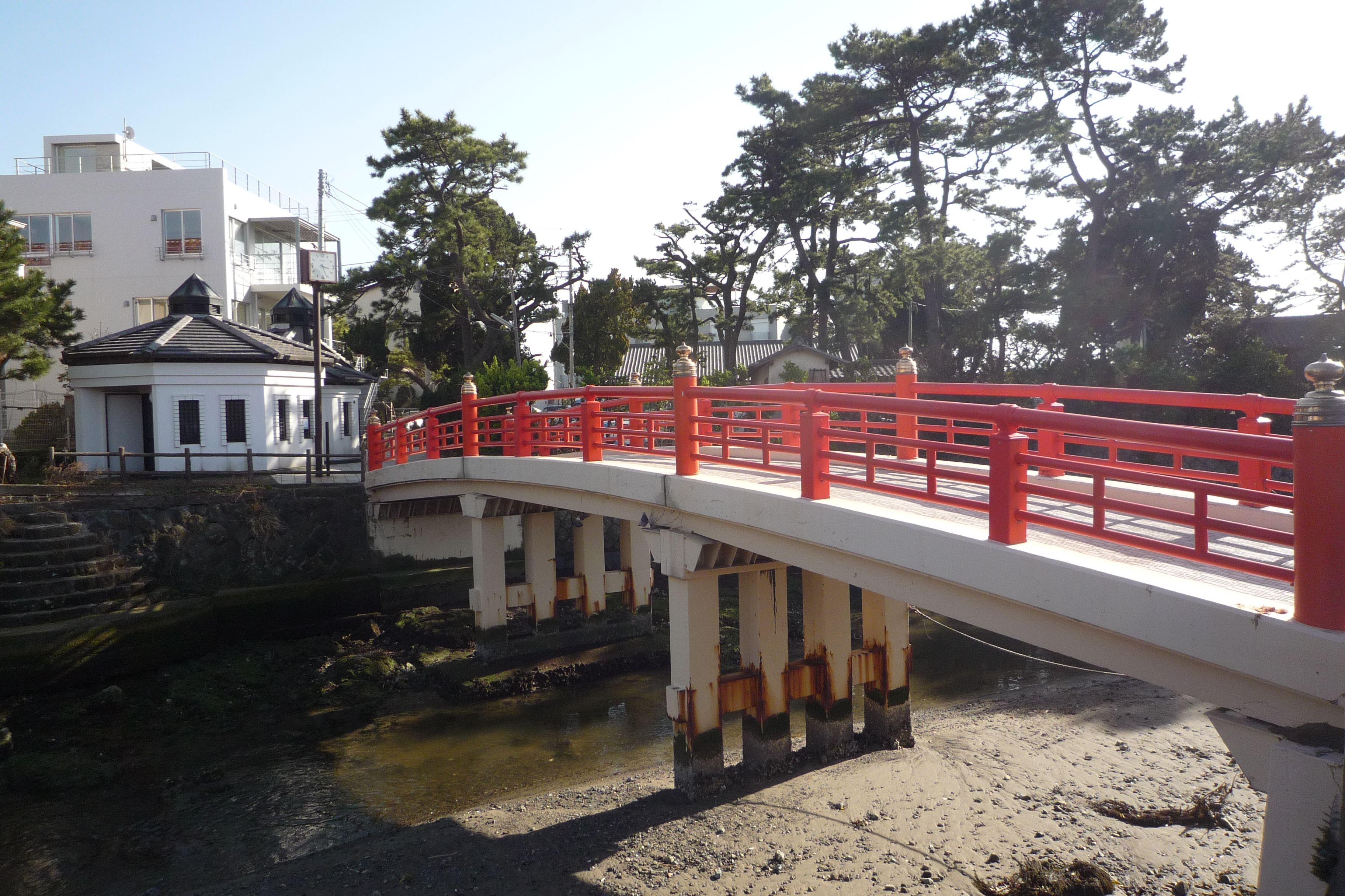 森戸神社の太鼓橋（みそぎ橋）